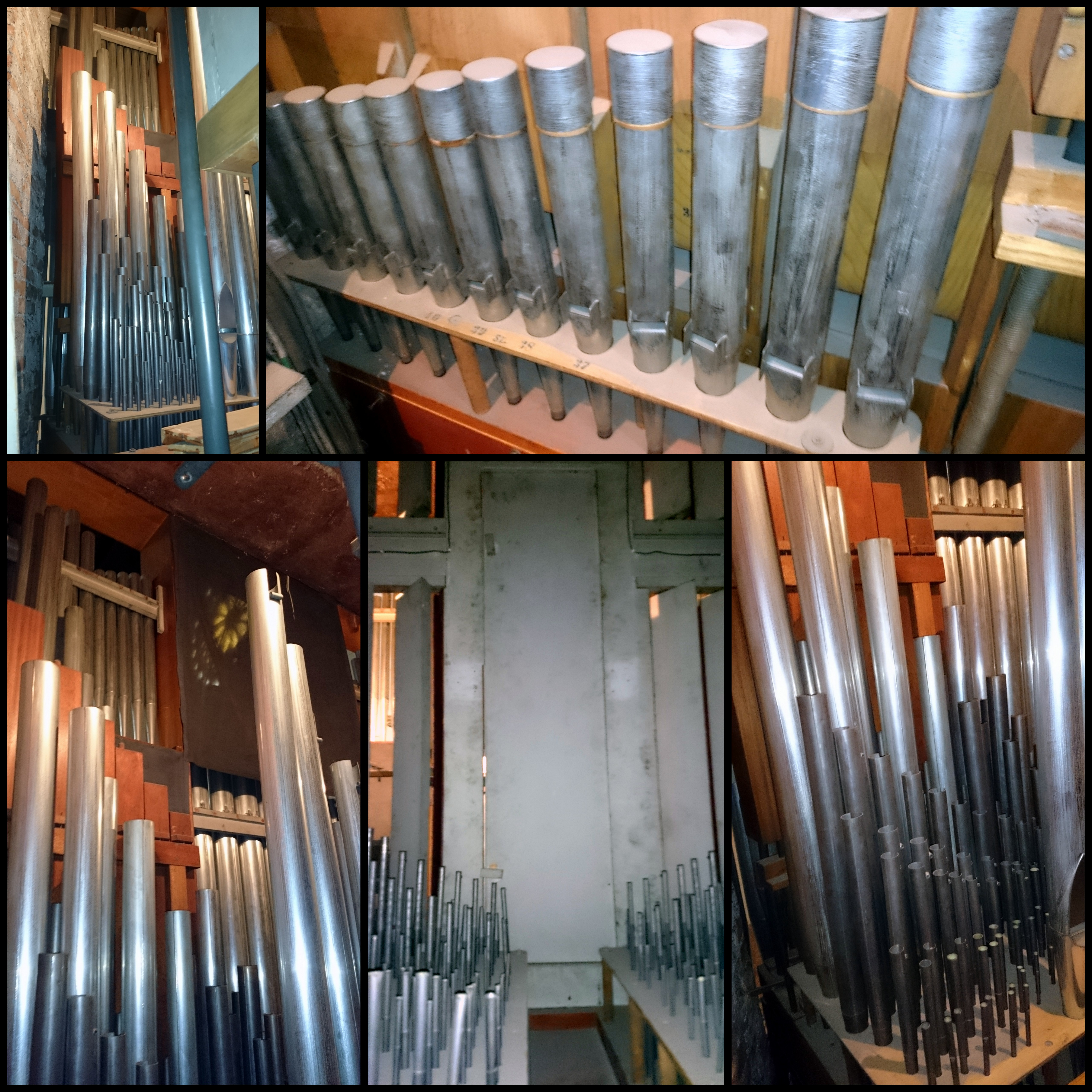 L'autore sono io, la foto rappresenta l'interno dell'organo del Sacro Cuore.